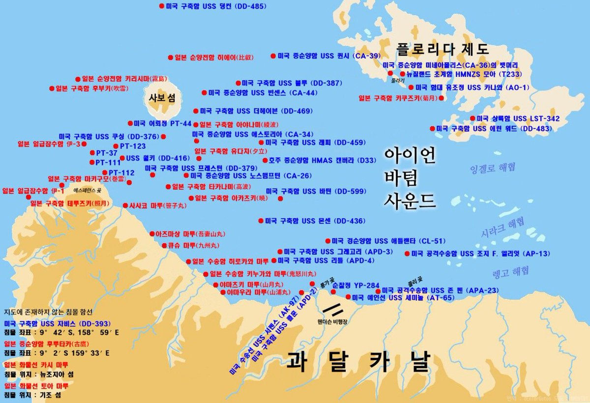 아이언바텀 해협에 침몰한 함선의 위치와 이름을 나타낸 지도.